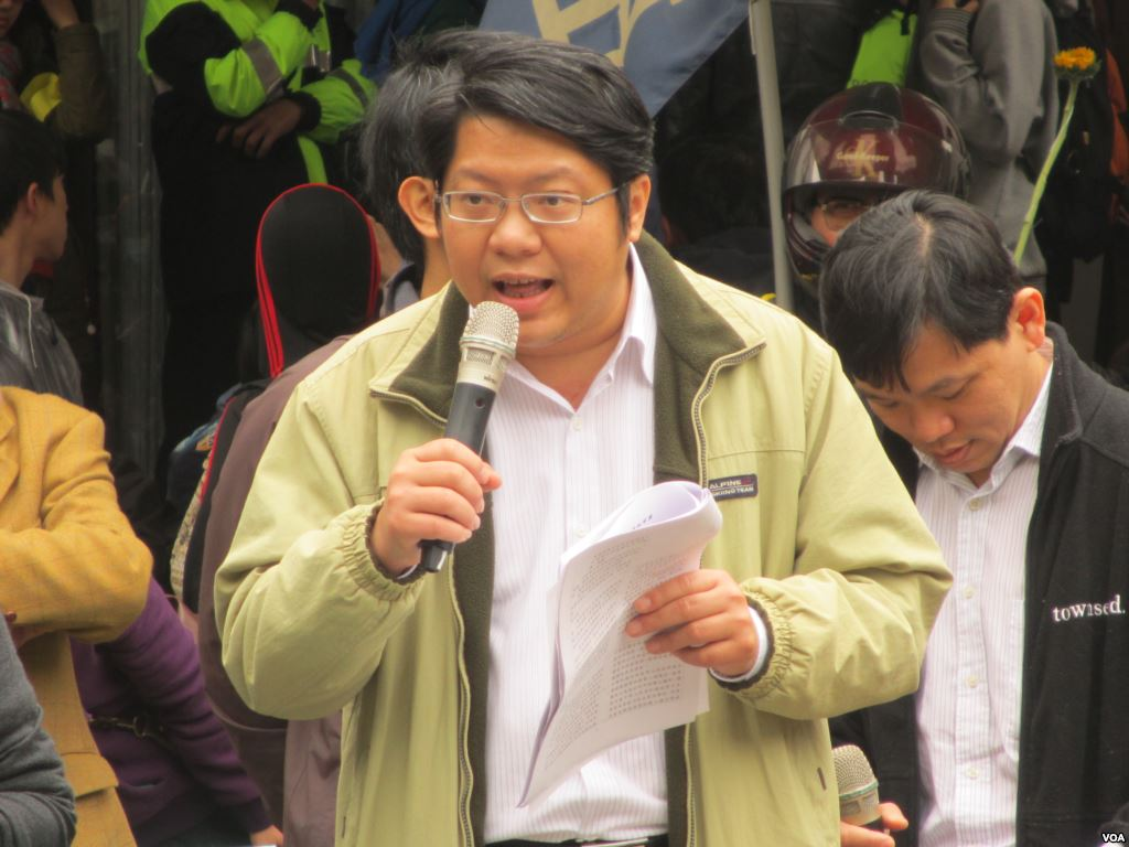 兩岸協議監督聯盟召集人賴中強。